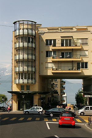 Wohnhaus in Montreux